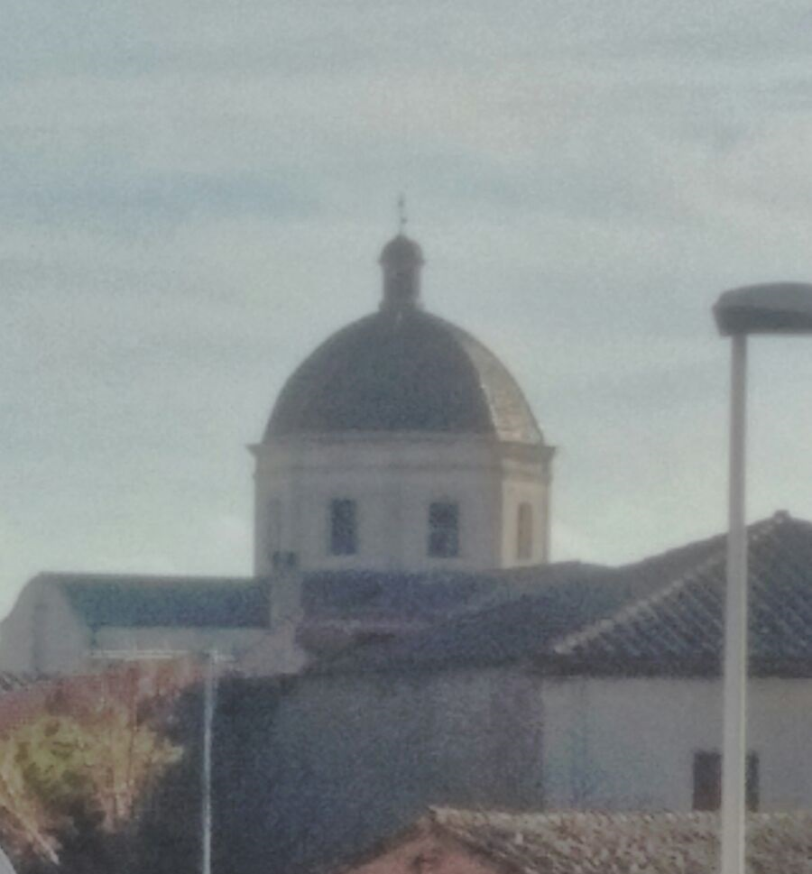 Cupola san biagio villasor